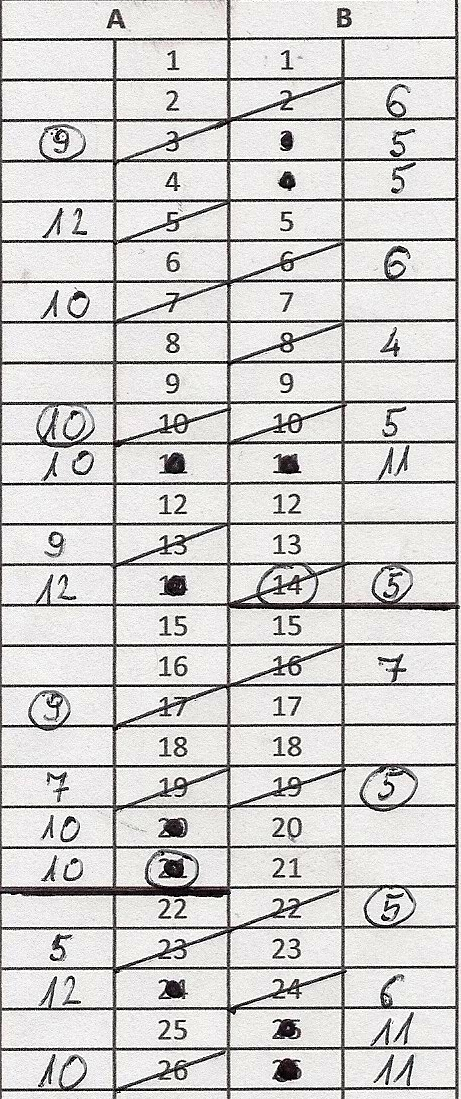 Przykładowy fragment protokołu FIBA